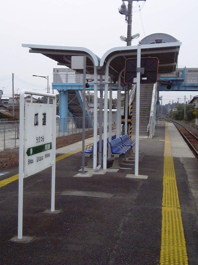 瓜連駅ホームベンチ(2009/10/24撮影)